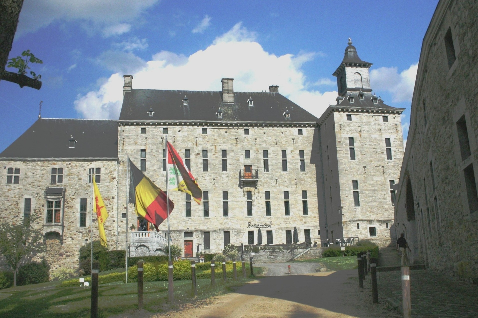 Schlass vun Harzé.